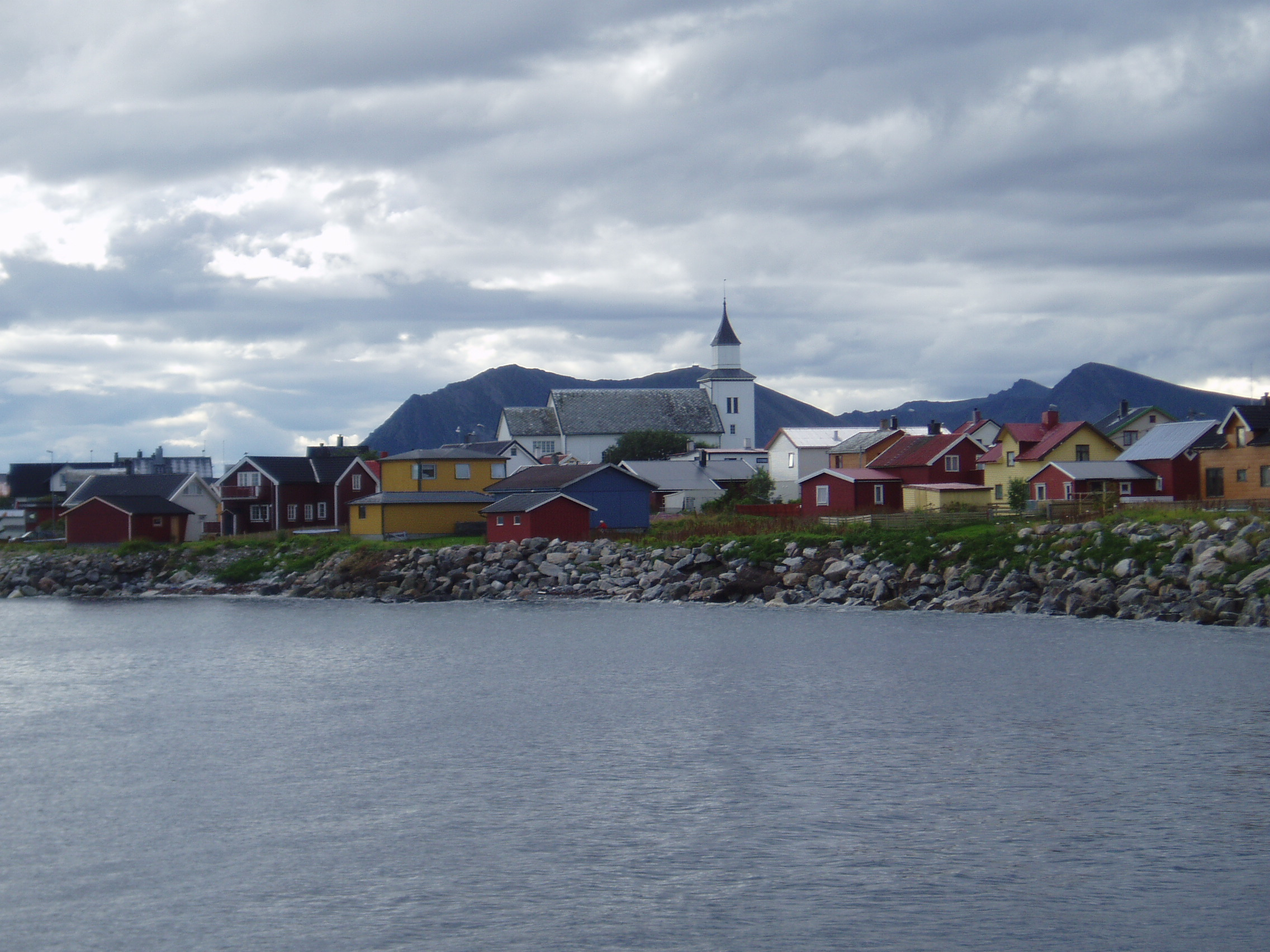 Andennes, Vesteralen Islands